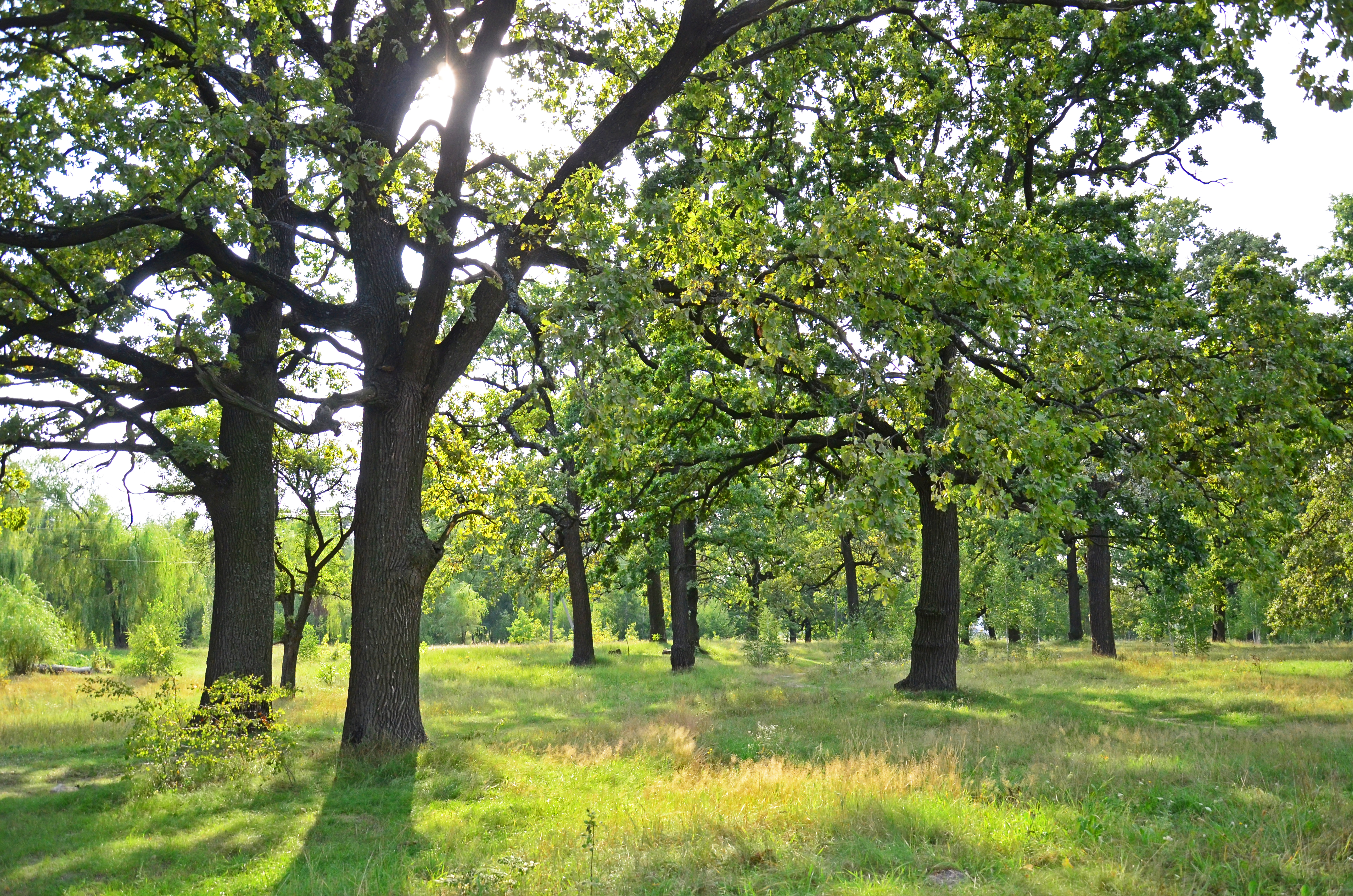 «Хутір Чубинського», Бориспільський район, Великоолександрівська сільська рада